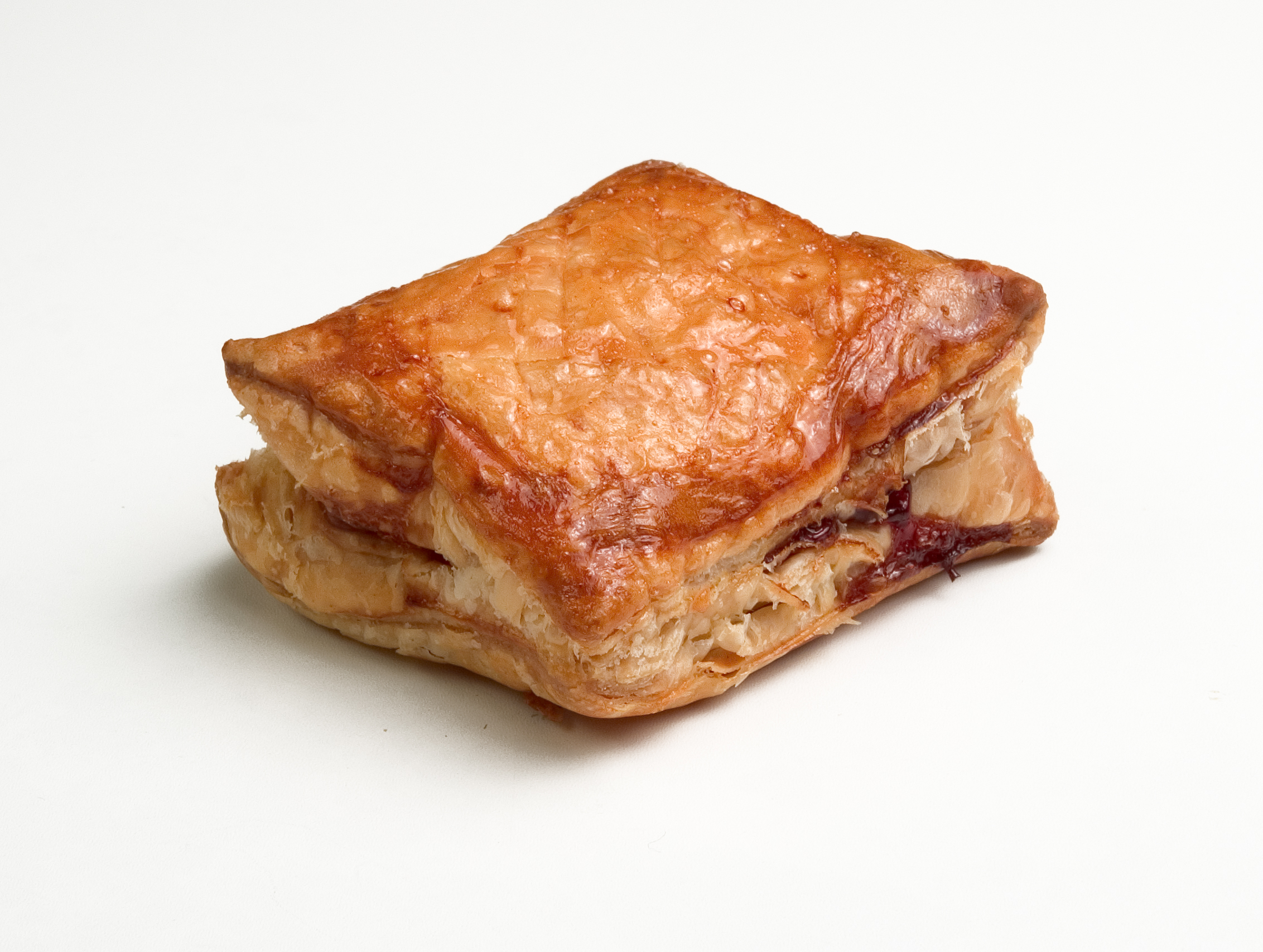 Rissole à la poire Blesson, fabricant société #thomasleprince Pâtisserie savoyarde à base de compote de poires Blesson (variété ancienne savoyarde)